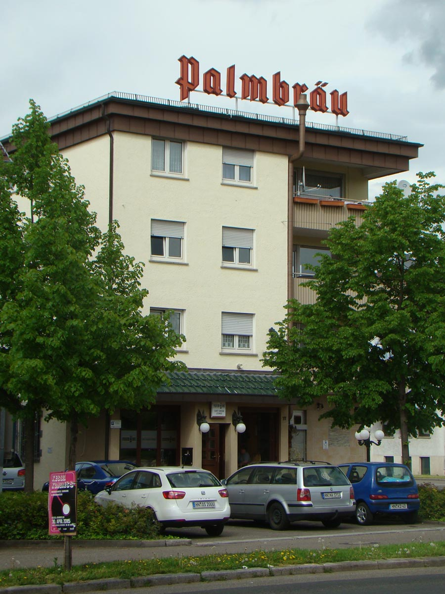 Heilbronn, Palmbräu-Werbung an der Ecke Karlstraße/Oststraße